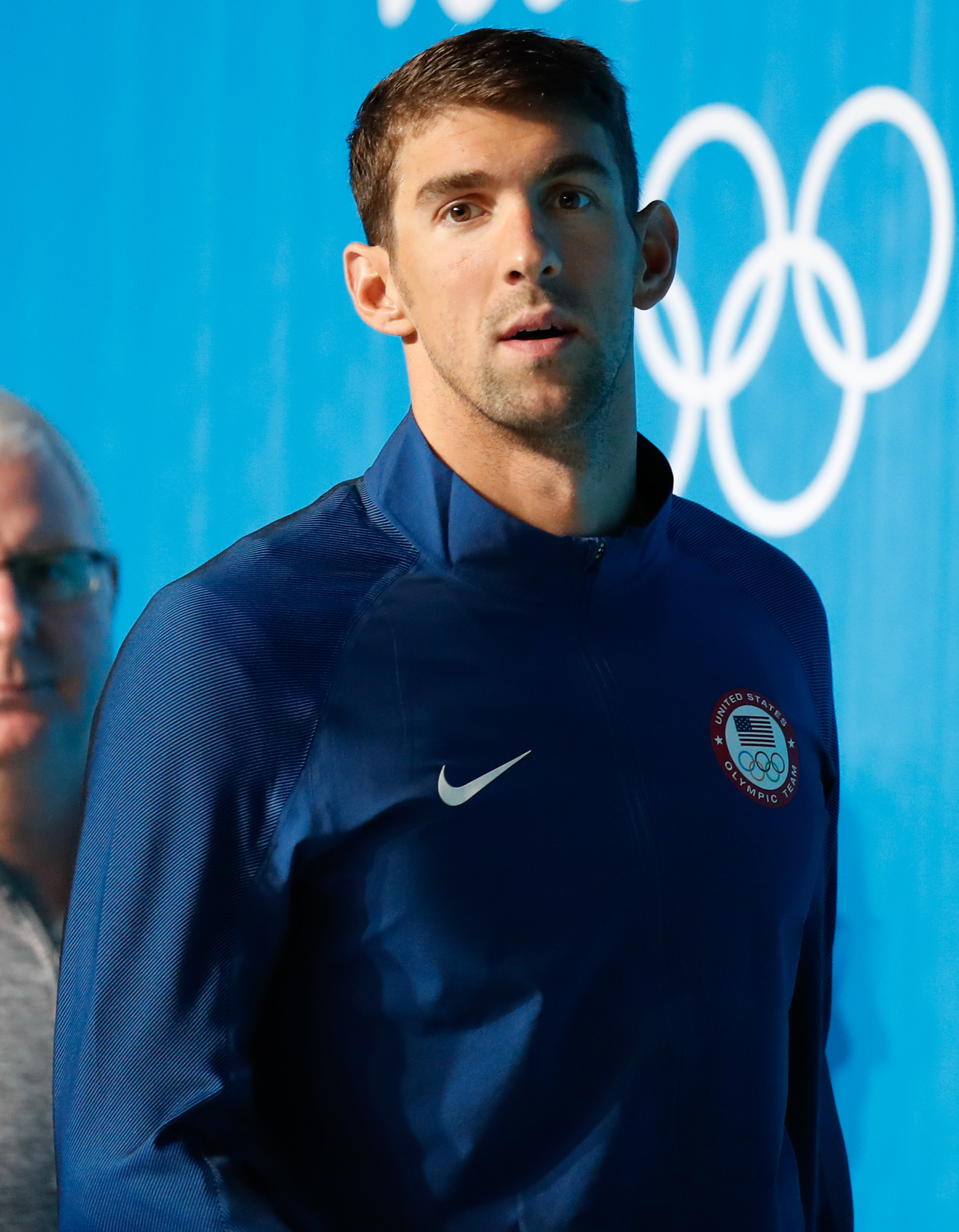 Rio de Janeiro - O nadador Michael Phelps, norte-americano recordista de medalhas olímpicas, 22, concede entrevista no Parque Olímpico dos Jogos Rio 2016 (Fernando Frazão/Agência Brasil)